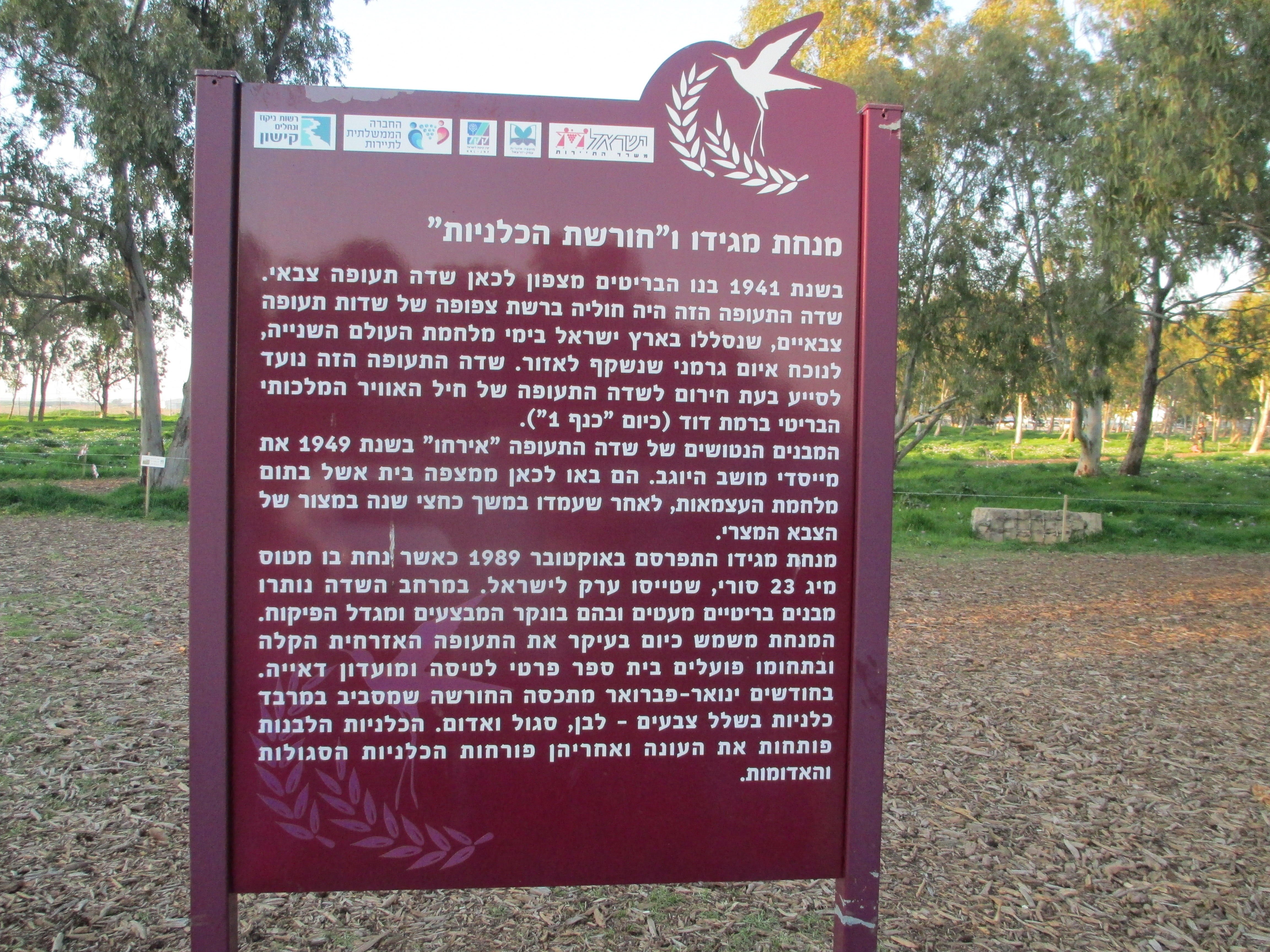 שלט הסבר בחורשת הכלניות ליד מנחת מגידו